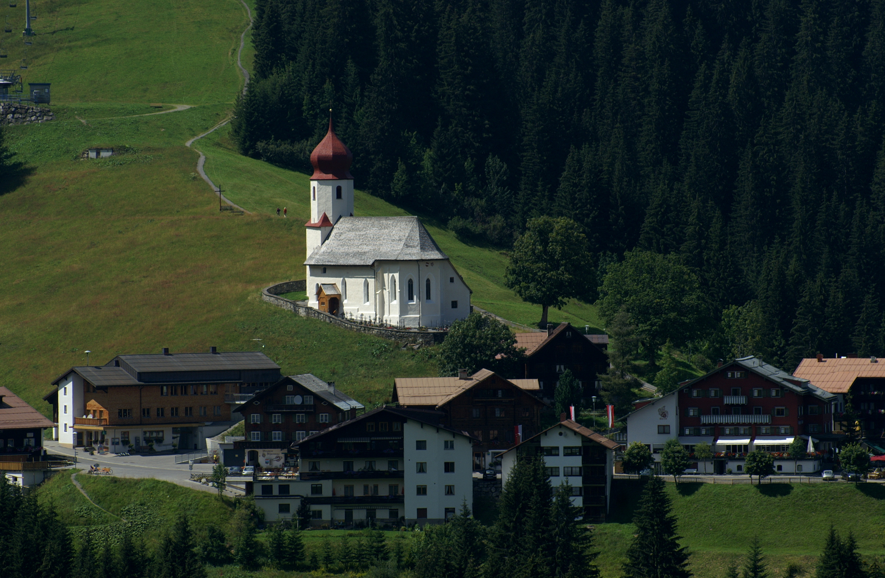 das Kirchdorf von Damüls mit der Pfarrkirche St.Nikolaus. Fotografiert vom Dach der Faschina Hahnenköpfle-Galerie. Veröffentlicht: Georg Kessler in "Freizeit im Ländle, Die schönsten Ausflugziele in Vorarlberg ISBN 978-3-7022-3068-5 2010.